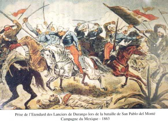 Bataille de San Pablo del Monte 1863, gravure de XIXème siècle